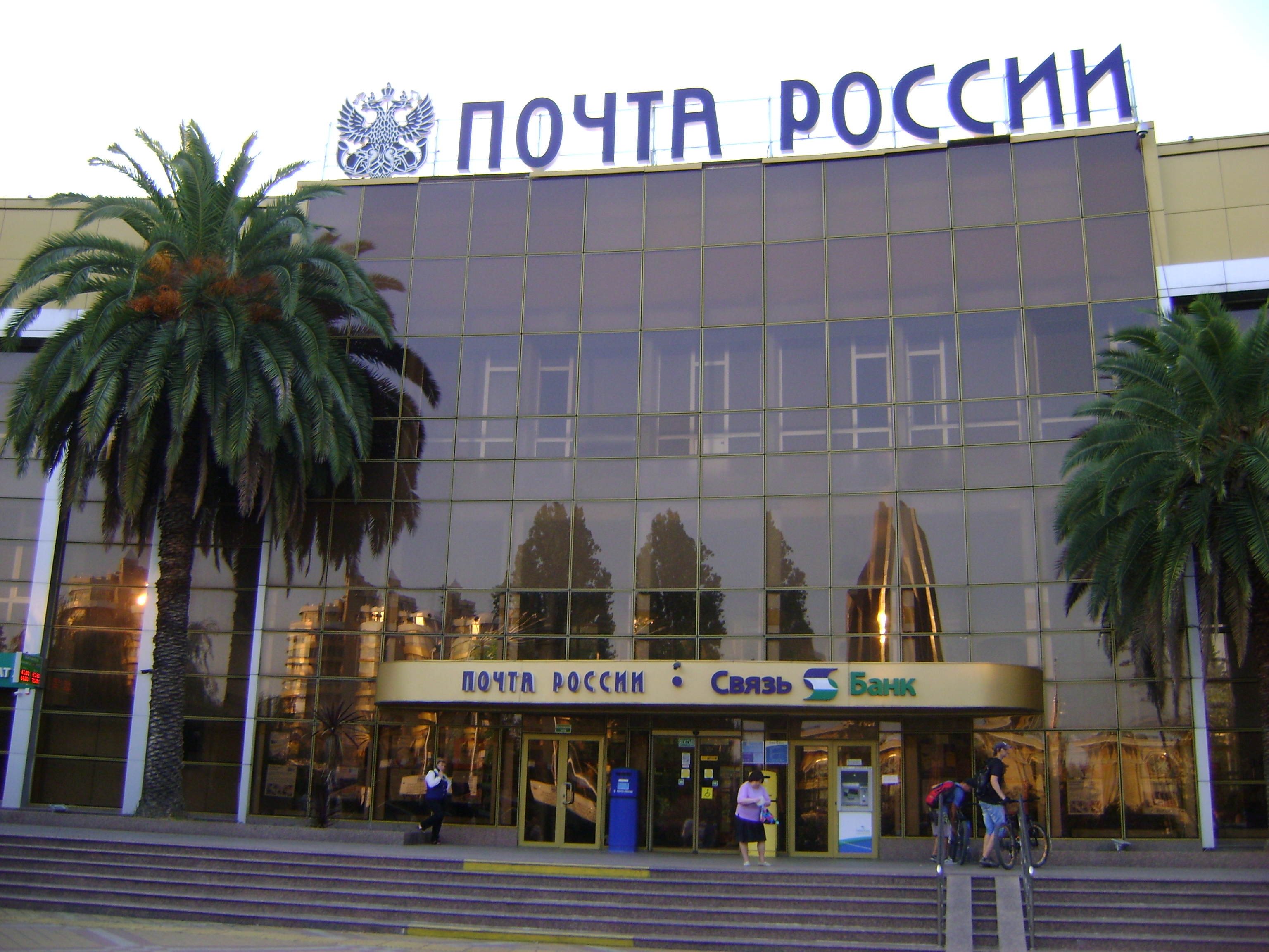 "Пошта Росії" в Сочі.